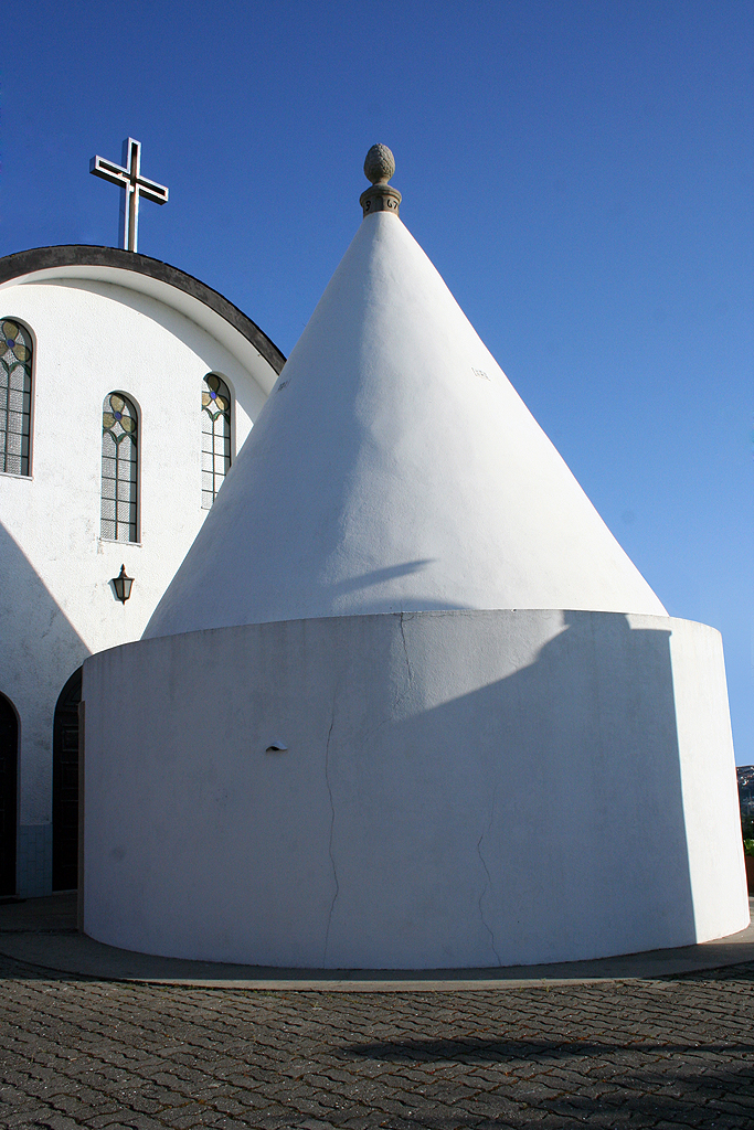 Capela de Stº. Estevão